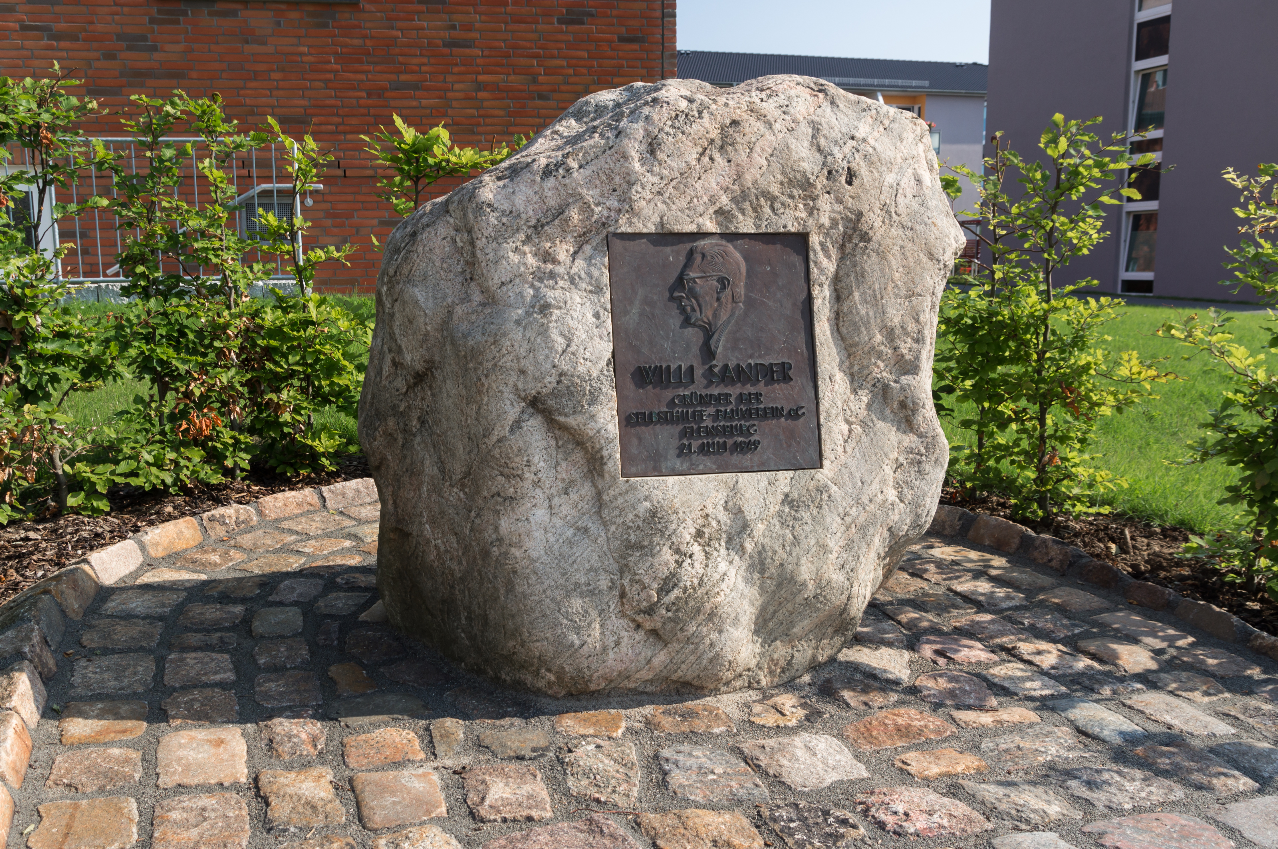 Flensburg-Fruerlund, Gedenkstein Willi Sander des SBV. Eingelassene Tafel mit der Aufschrift: "Willi Sander Gründer der Selbsthilfe Bauverein eG Flensburg 21. Juli 1949"